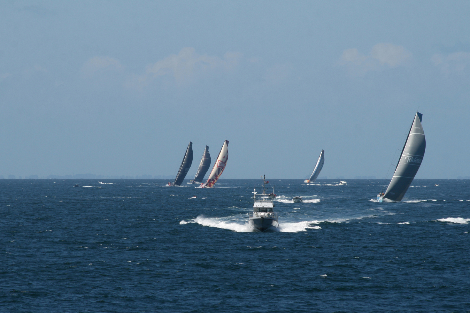 Volvo Ocean Race venant de Lorient allant vers les coureaux de Belle-Ile